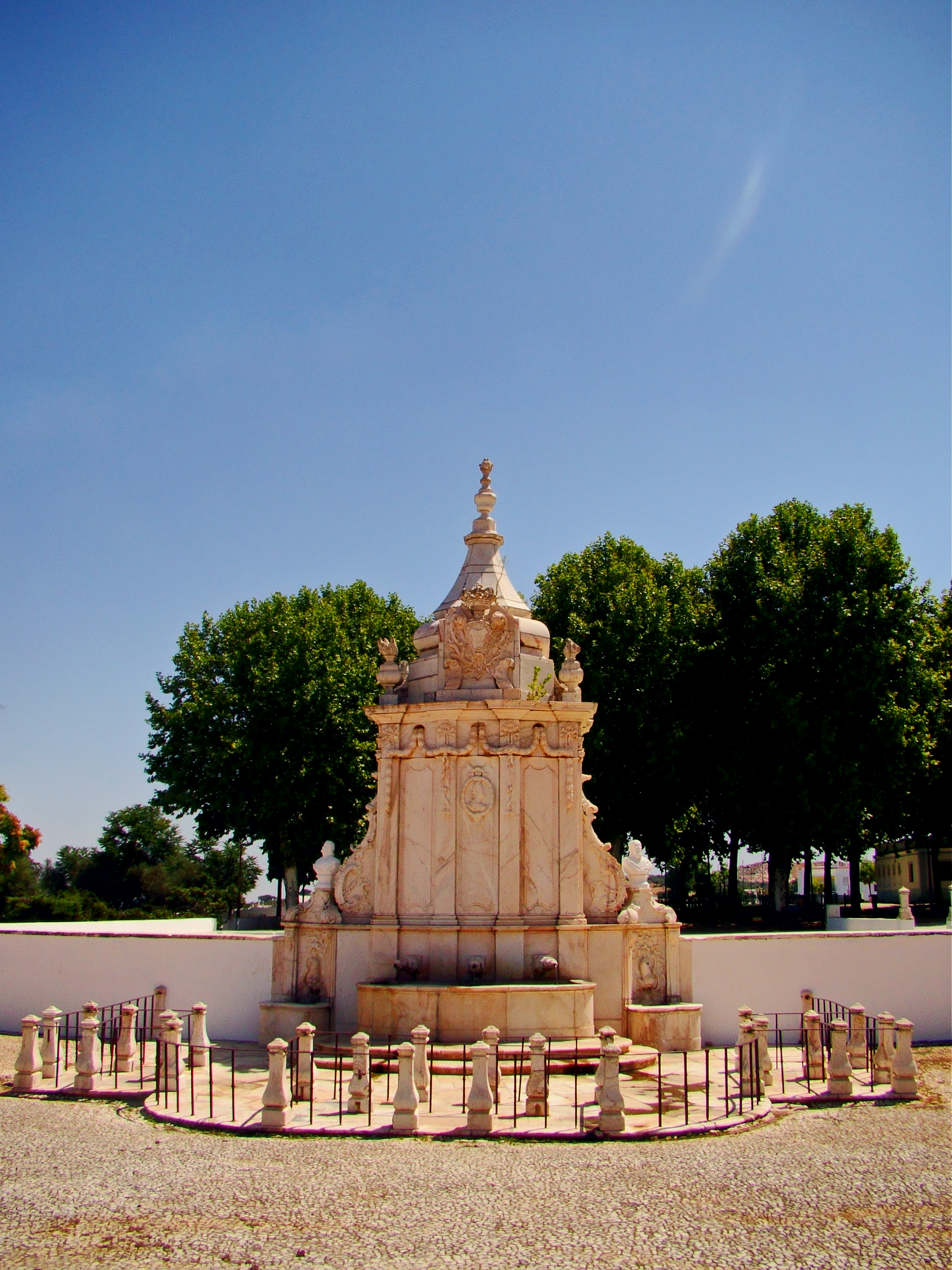 Chafariz Borba